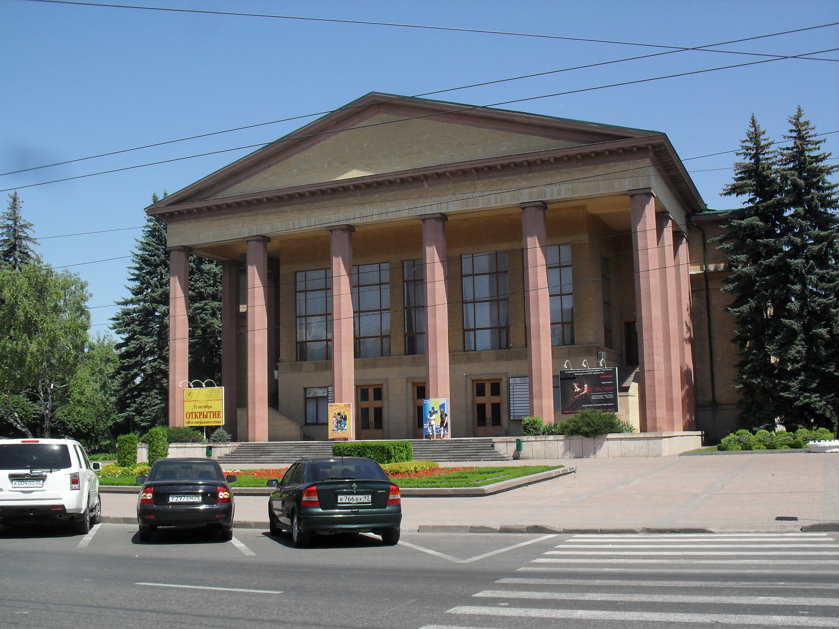 Ставропольский академический ордена «Знак Почёта» театр драмы имени М. Ю. Лермонтова